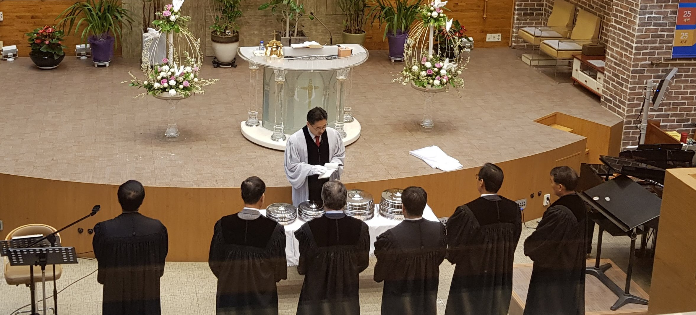 성찬식 집례모습 수원 사명의 교회